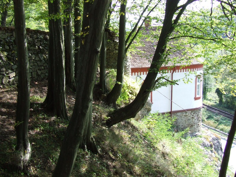 Ciucea castle, Cluj County, Romania